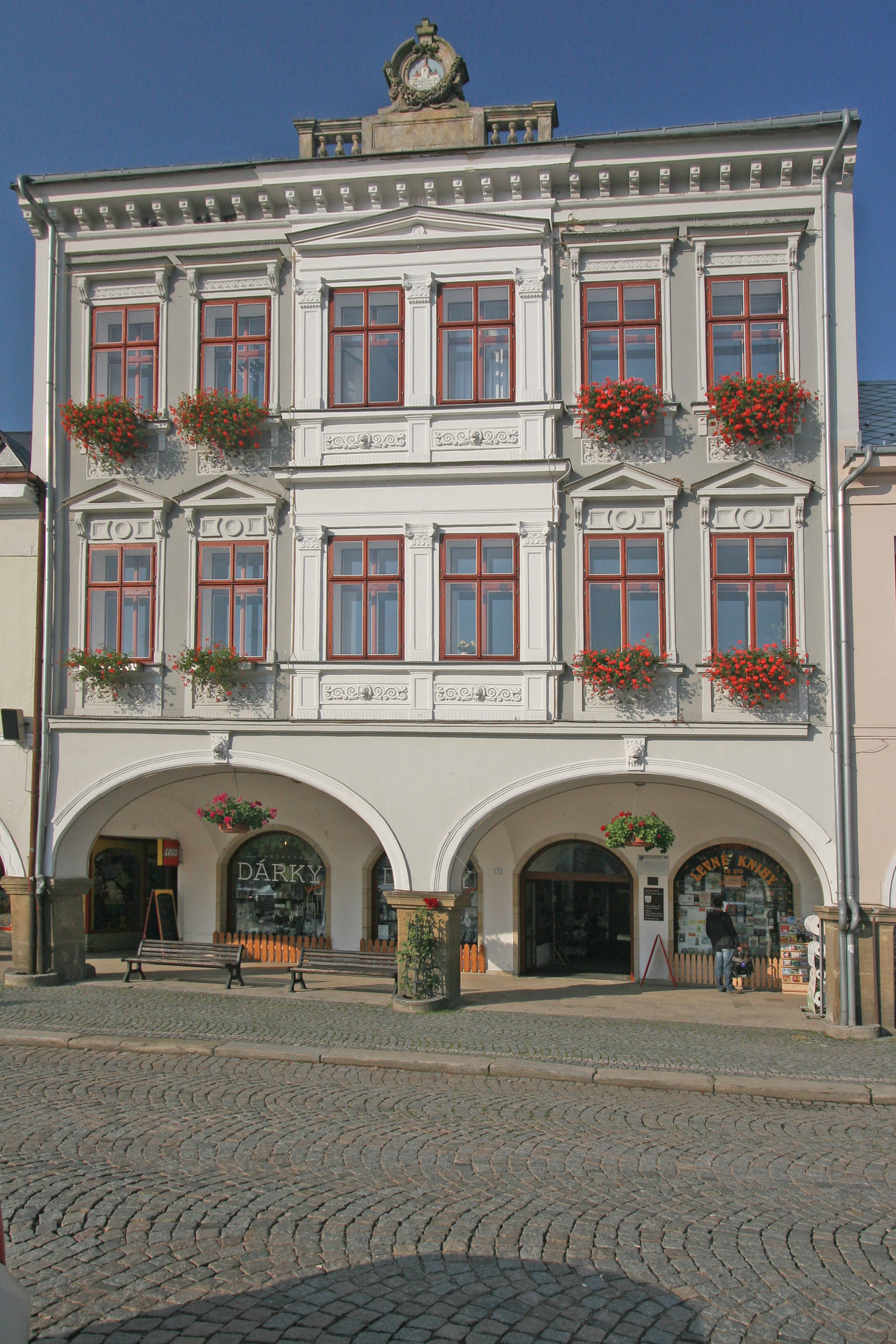 Dům čp. 7, Mírové náměstí 7, Ústí nad Orlicí.